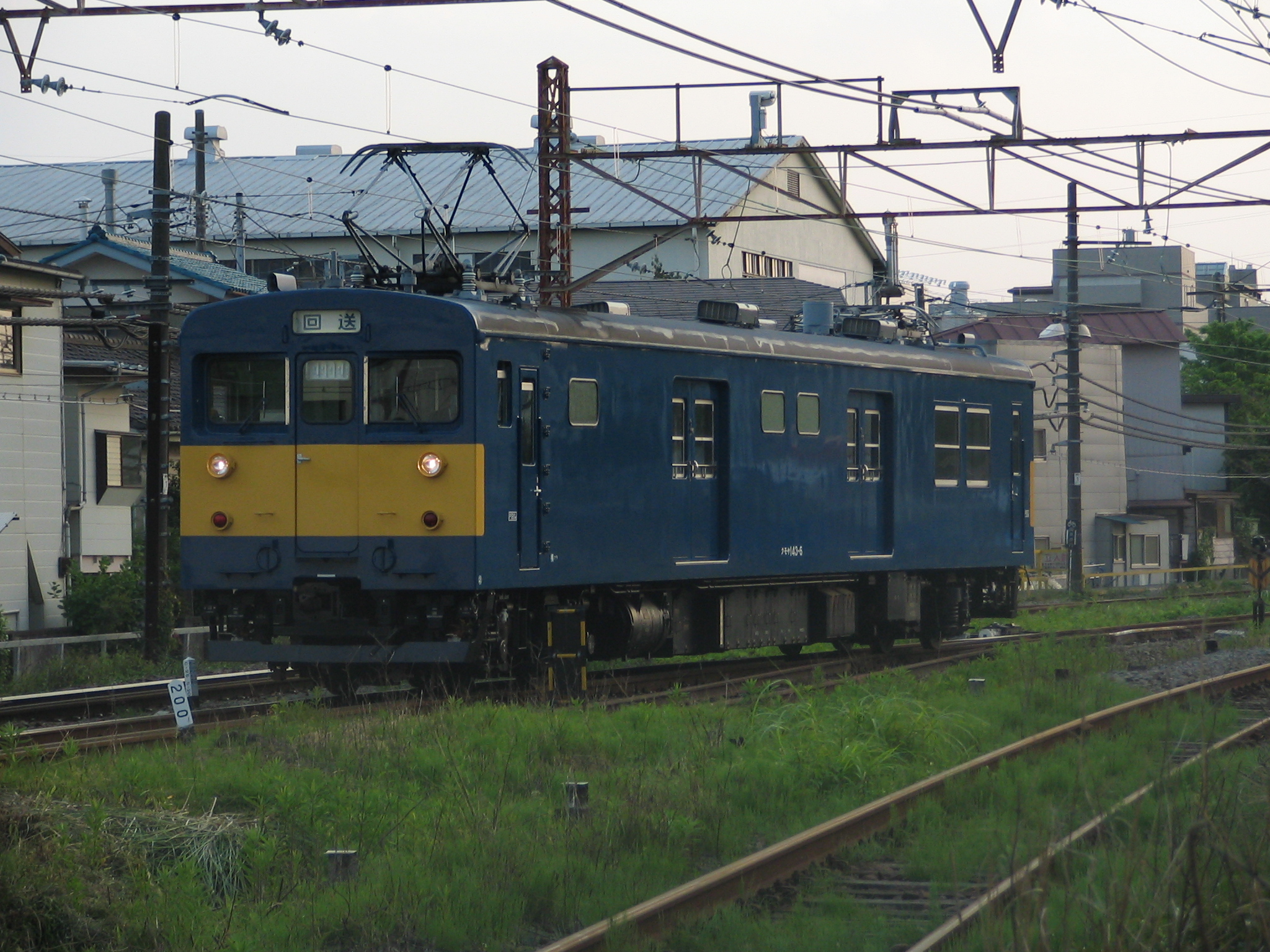 国鉄クモヤ143 大船付近にて kumoya143 type train at Ofuna.